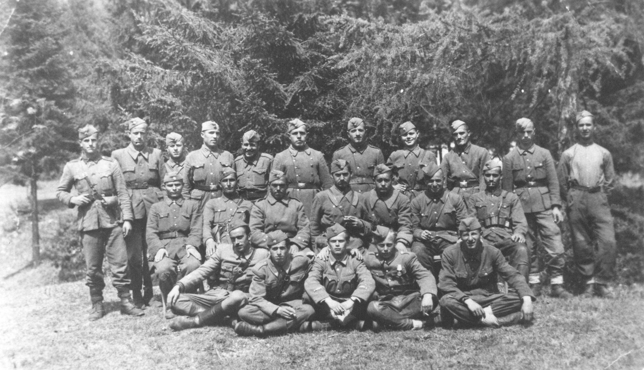 17. divizija, II krajiška NOU brigada, u Sloveniji 1945. Borci albanske narodnosti (1. četa 2. bataljona). S leva sede: 2. Adžić Dragan, zamenik političkog komesara čete, 3. Dimitrijević Prvoslav, omladinski rukovodilac.